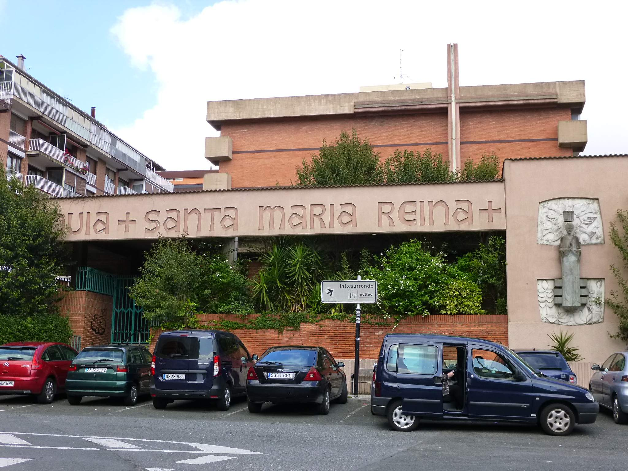 Iglesia de Santa María Reina, en Donostia-San Sebastián